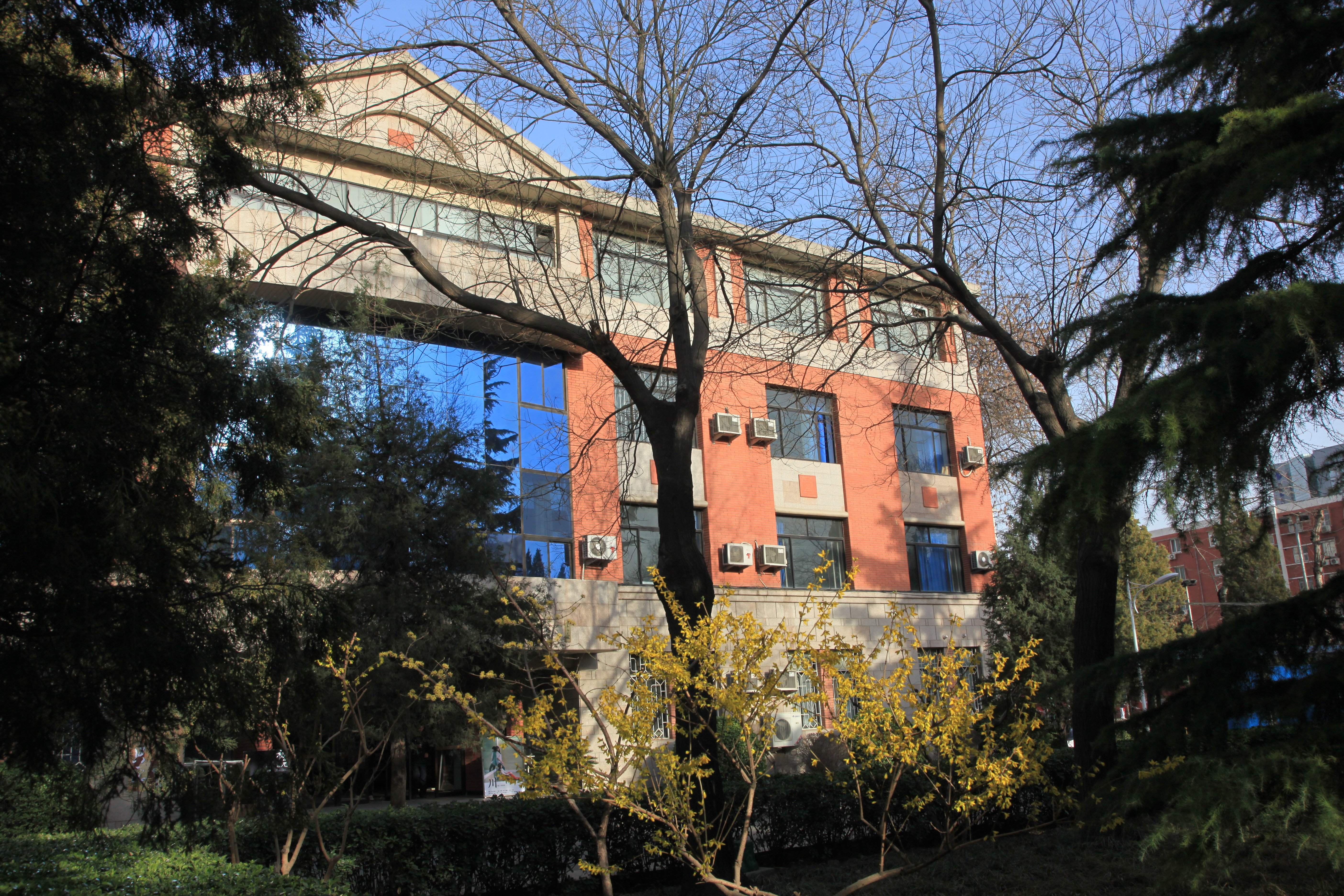 人大附中的绿化完好，古朴的逸夫楼掩映在一片林荫后，散发着岁月特有的味道。在附中其他光鲜的大楼映衬下，逸夫楼，像是上个世纪遗留下的陈旧遗产，温柔地呵护着一缕学子的墨香情。